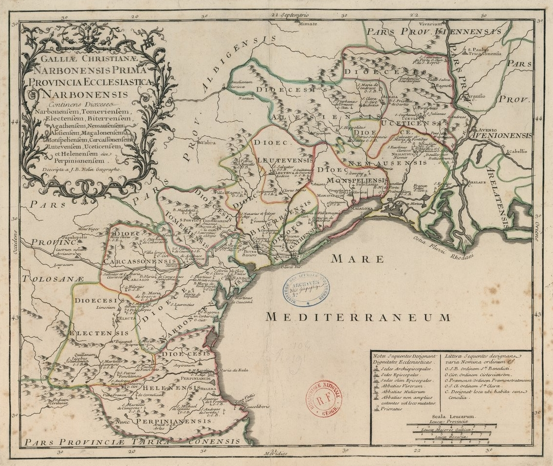 Carte de l'ancienne province ecclésiastique de Narbonne, insérée dans la Gallia Christiana (1715/1759).